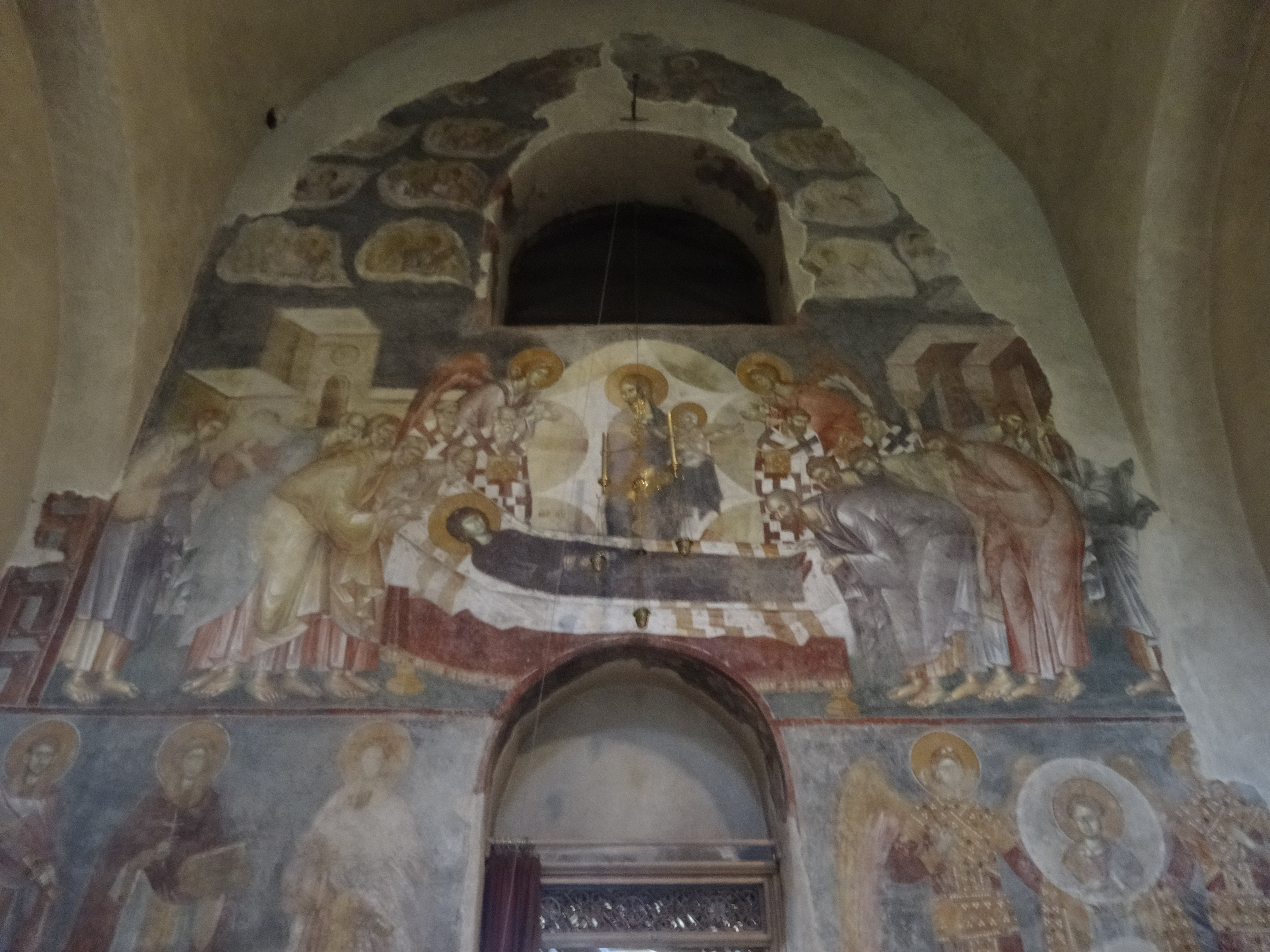 Жича је српски средњовековни манастир из прве половине 13. века, који се налази у близини Краљева. Подигао ју је први краљ Србије, Стефан Немањић.